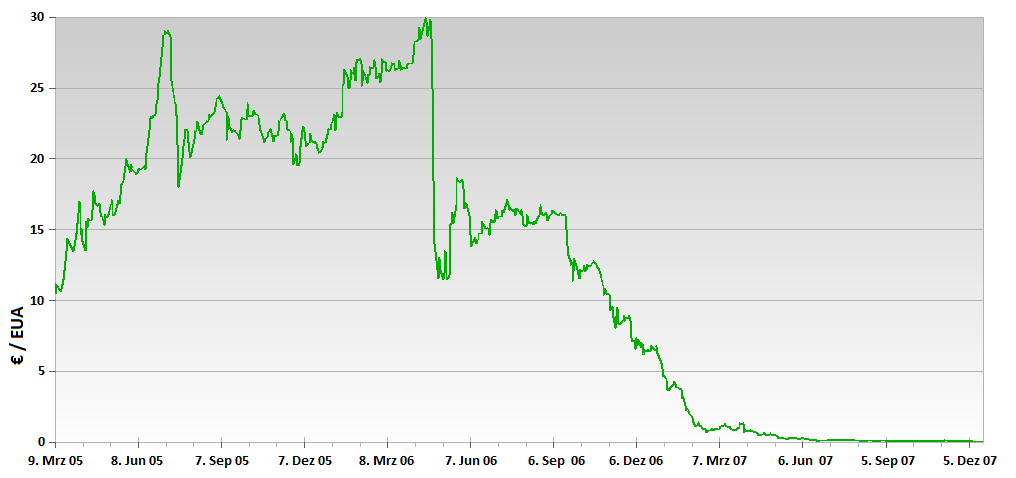 Preisentwicklung der EU Emissionszertifikate (EUA) von März 2005 bis Dezember 2007